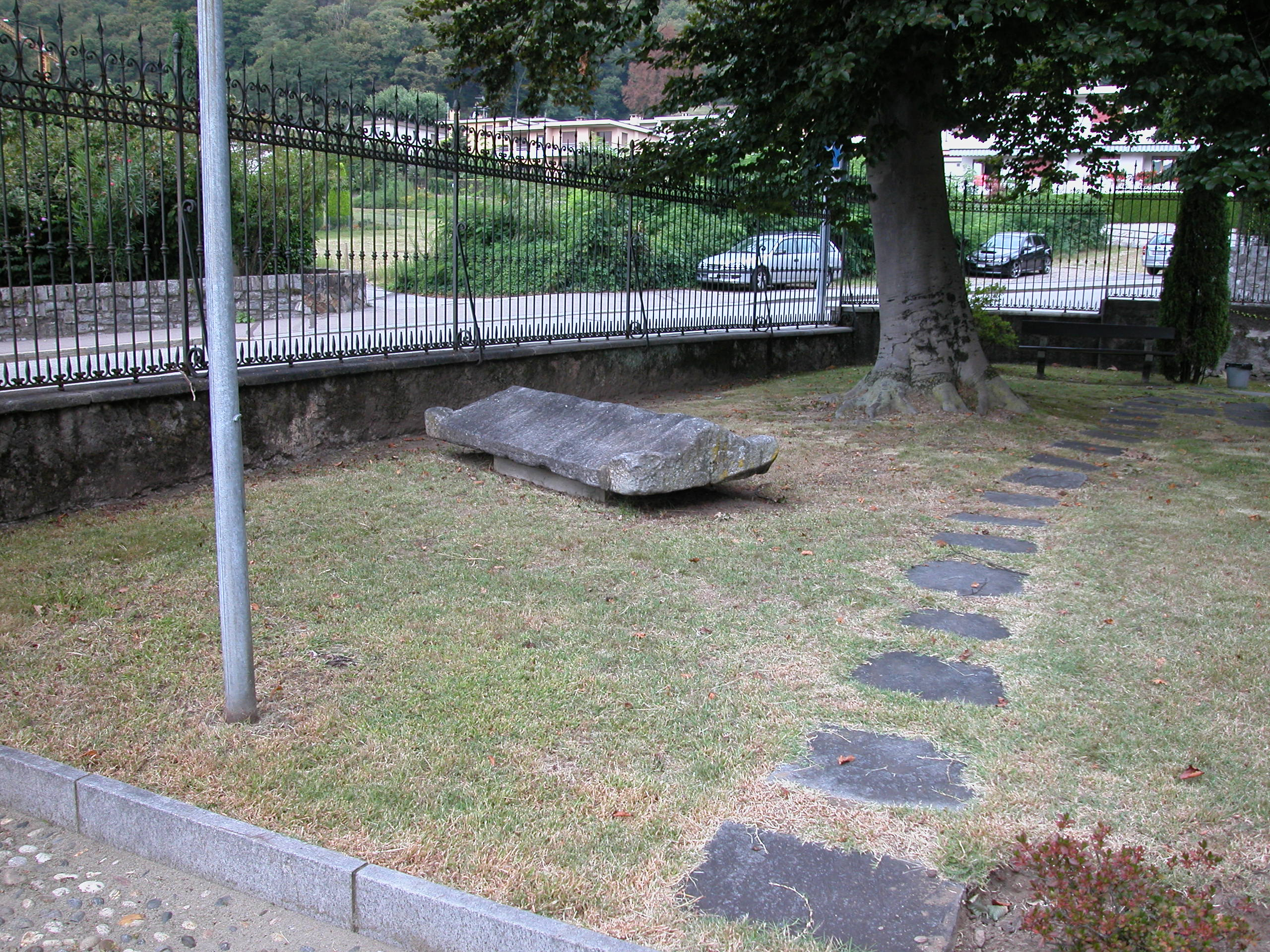 Coperchio di tomba etrusca nel giardino della casa comunale di Bioggio